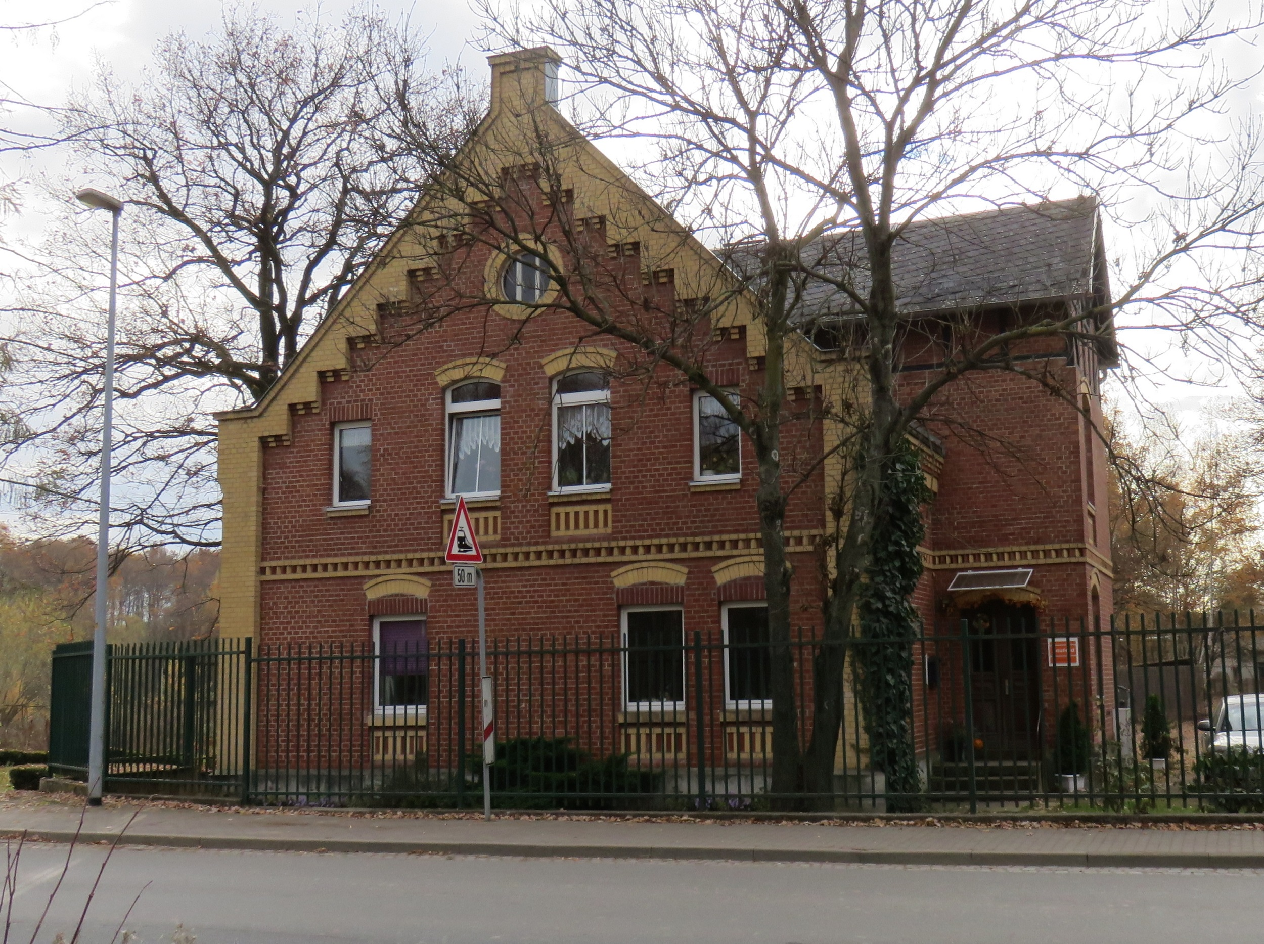 Drei Wohnhäuser einer Fabrik. Heute zum Teil Gewerbe, Wohn/Bürohäuser. Fabrik heute noch aktiv. Kulturdenkmale Chemnitz Klaffenbach.